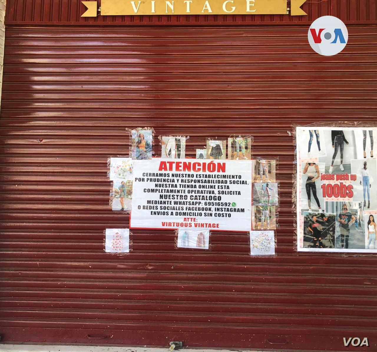 Los comercios se han limitado al funcionamiento solo de productos de primera necesidad; algunos negocios se volcaron en redes sociales o plataformas digitales para tratar de mantener su servicio y no perder el flujo económico.